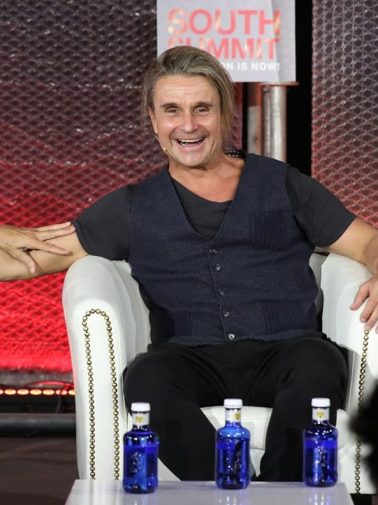 La alcaldesa de Madrid, Manuela Carmena, ha participado esta mañana en la clausura del South Summit, donde ha mantenido un diálogo con el músico y compositor Nacho Cano. Ha sido en La Nave de Villaverde, donde se han reunido emprendedores, inversores, administraciones, empresas y medios de comunicación en una nueva edición de South Summit, la mayor plataforma de innovación y desarrollo del ecosistema emprendedor. Carmena animó a los mecenas a apoyar a los jóvenes talentos no sólo con dinero, sino poniendo a disposición de estos su experiencia y sus conocimientos.